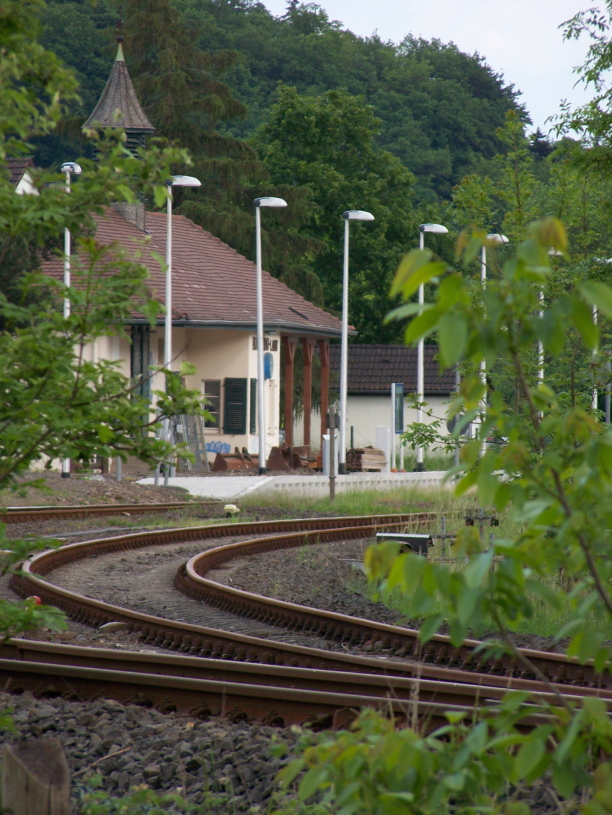 Blick von Westen auf den erneuerten Bahnsteig am Bahnhof Buchenau/Lahn